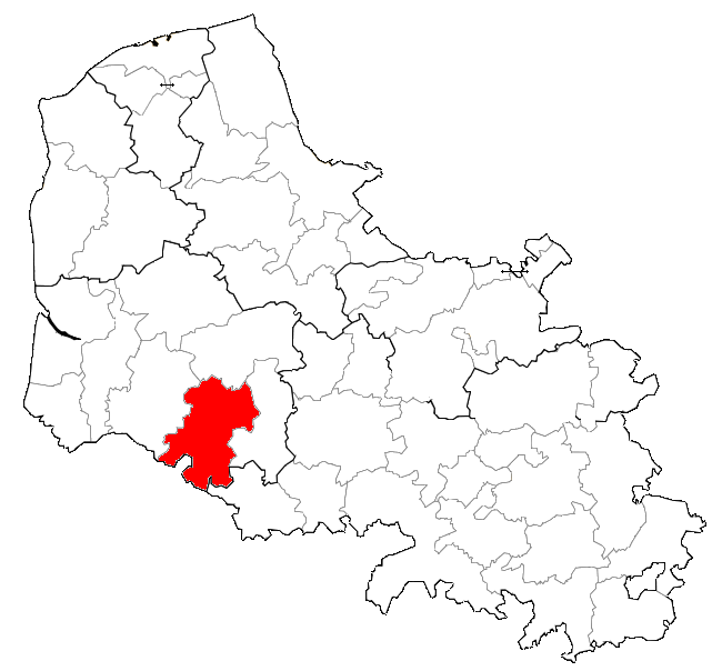 Localisation de la CCH dans le Pas-de-Calais.